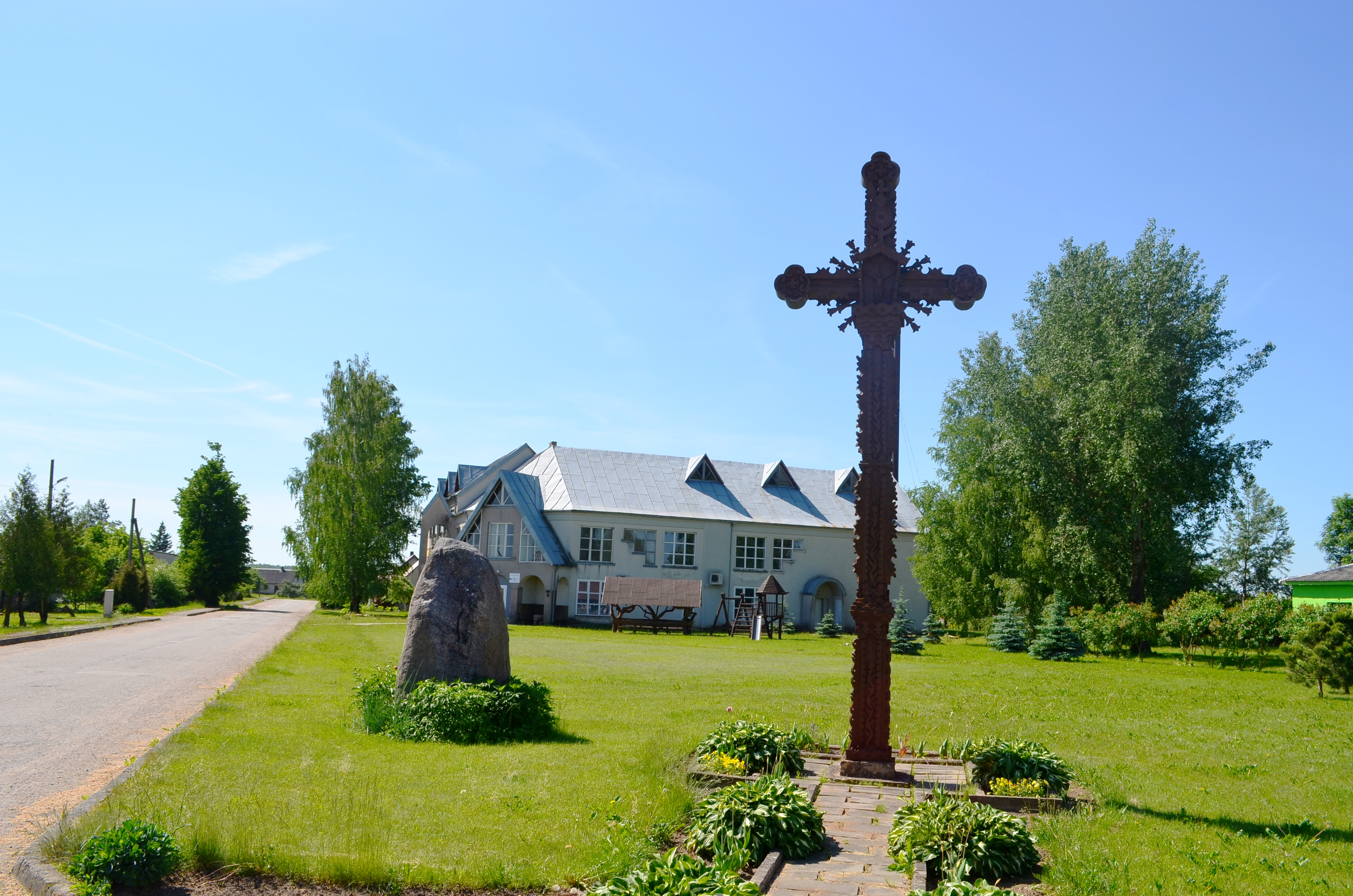 Preičiūnai, Pakruojo raj.